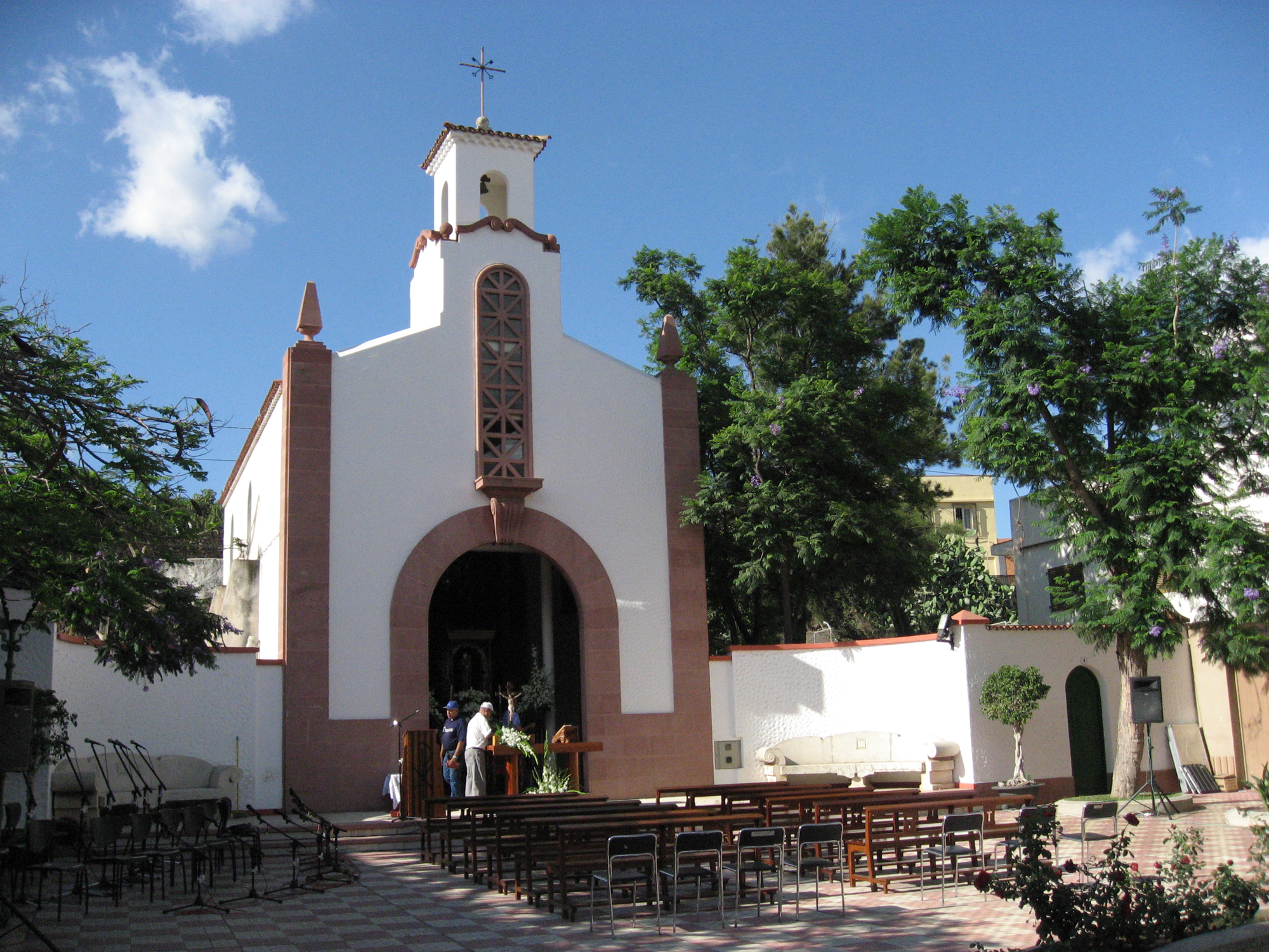 Iglesia de San Pedro Abajo, Guímar, Tenerife, Canarias, España